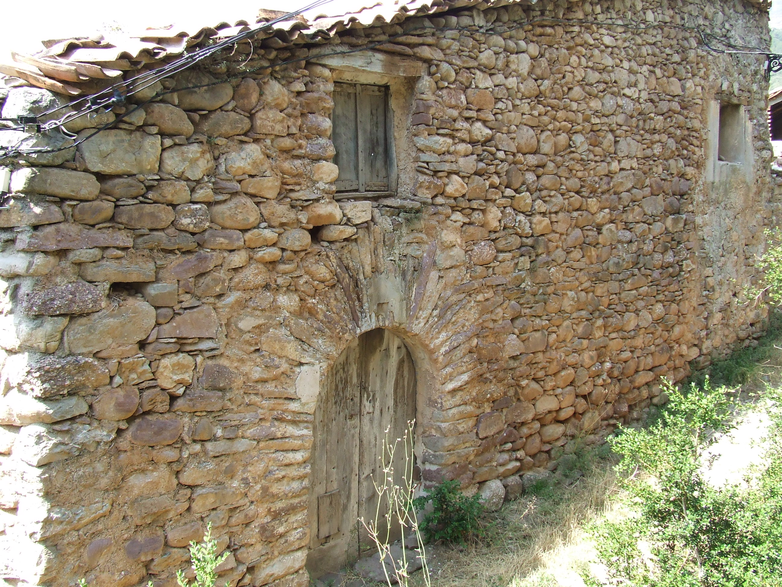 Una casa de Reguard (Senterada, Pallars Jussà)